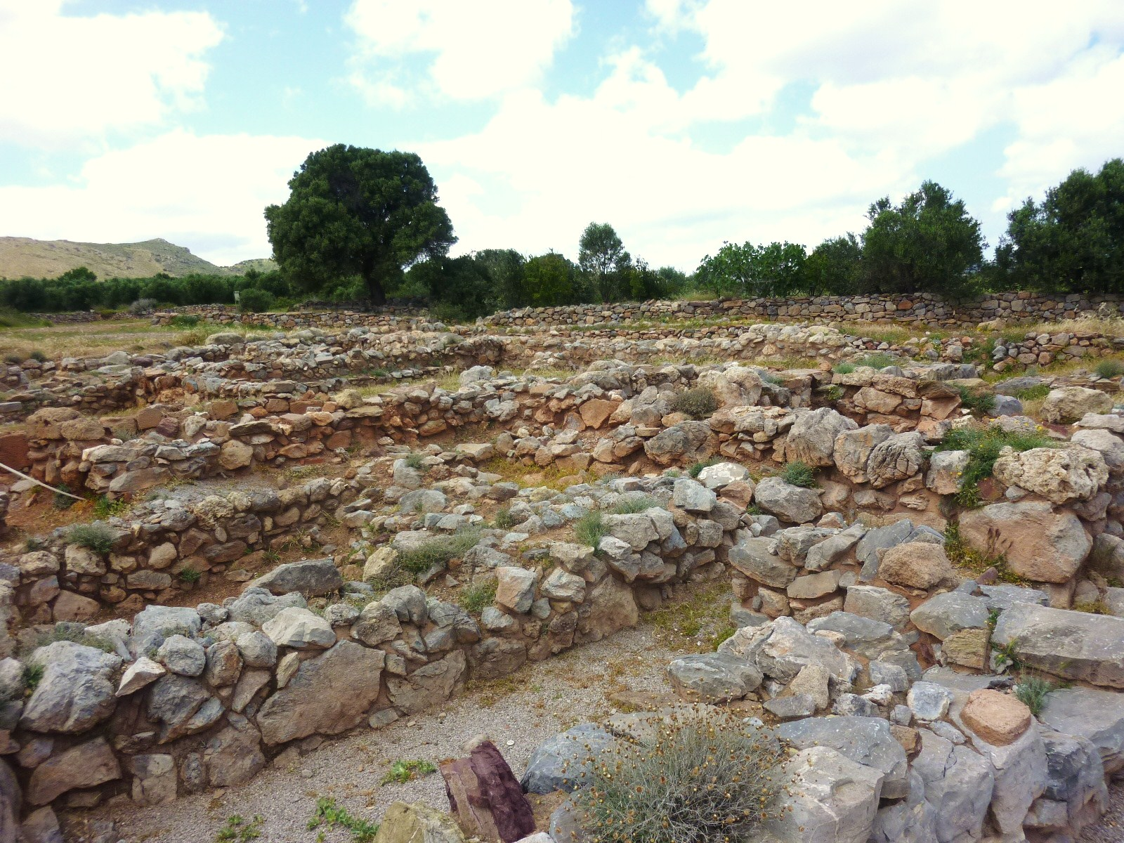 Ruines minoéennes de Roussolakkos, Crète